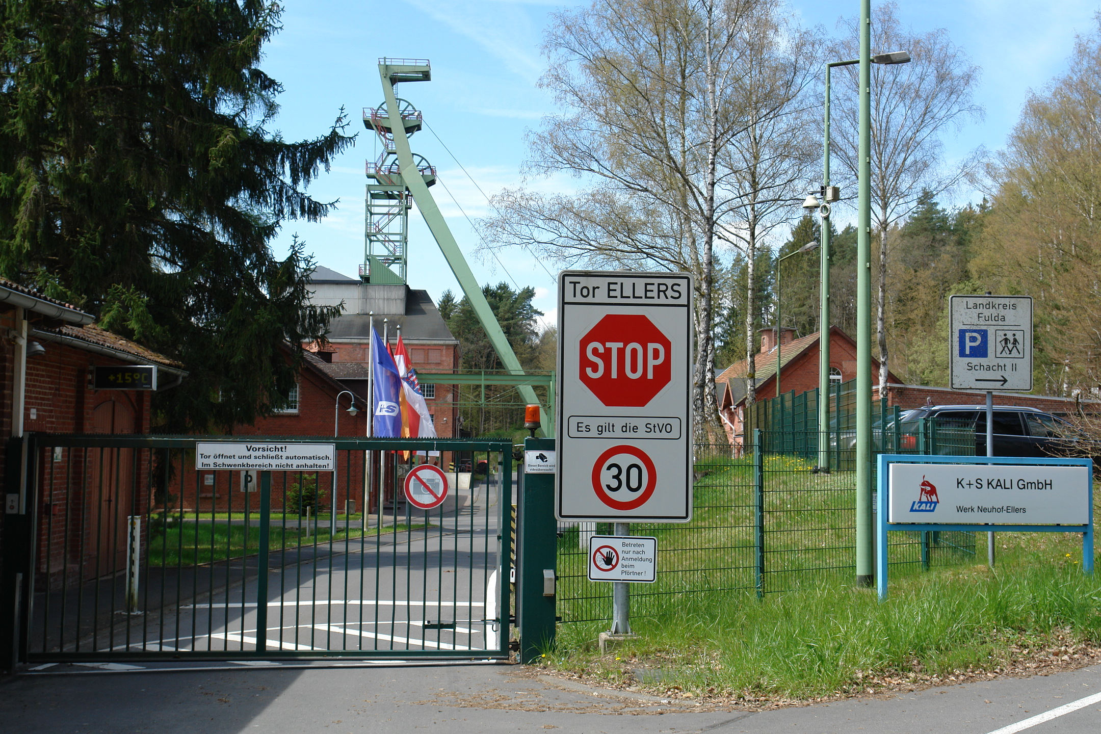 K + S Kali GmbH Werk Neuhof-Ellers